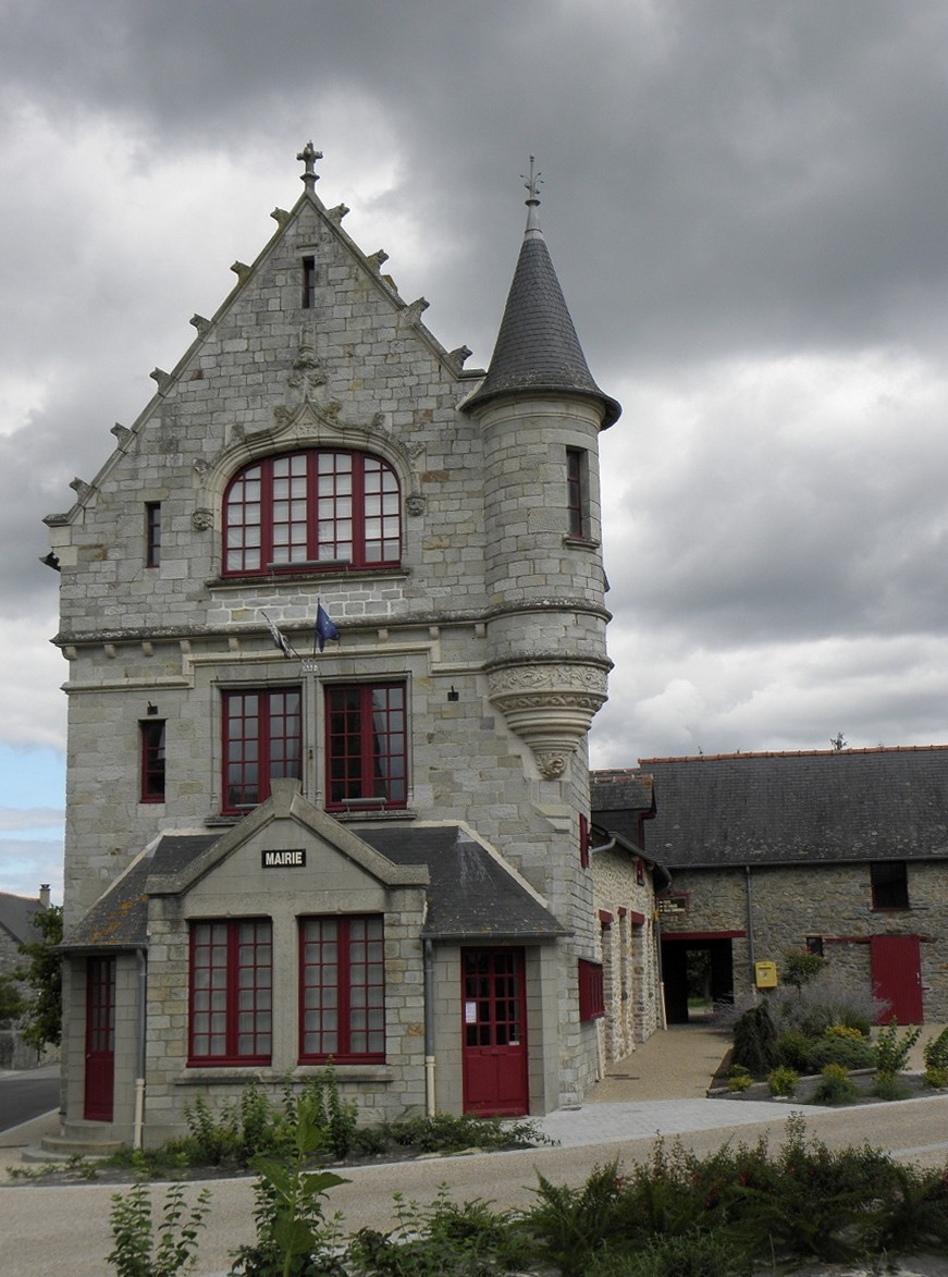 La mairie de La Chapelle-Erbrée (Ille-et-Vilaine, France) construite en 1905 par l'architecte Henri Mellet en style néogothique.